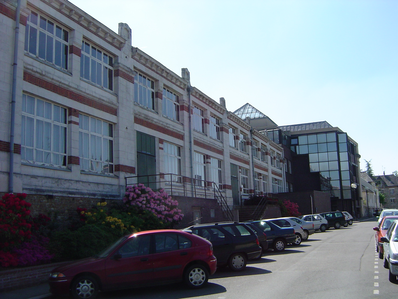 Le centre culturel (implanté dans l'ancienne usine Alcan). .